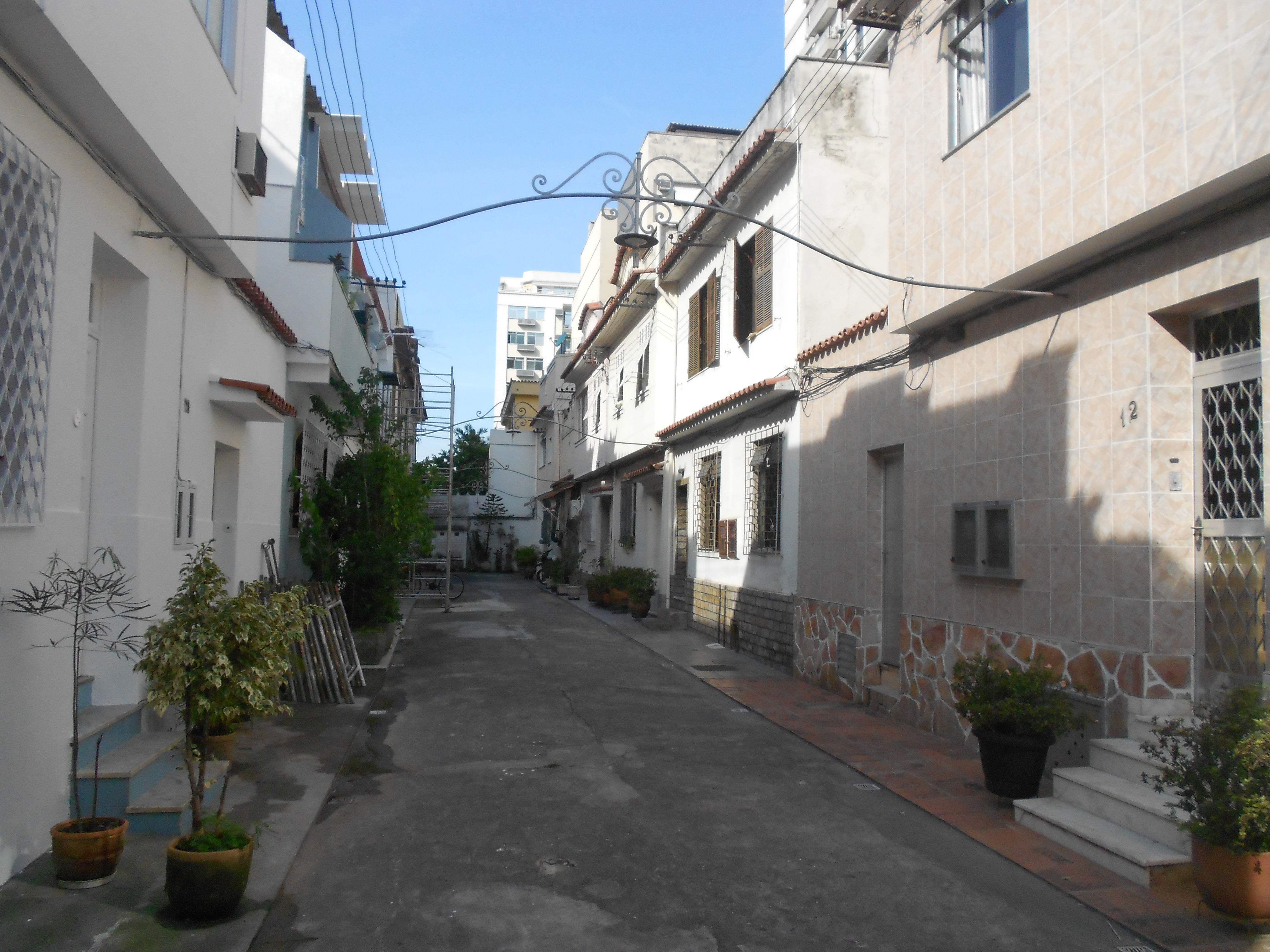 Vila na Rua Marques, em Humaitá, Rio de Janeiro, Brasil.